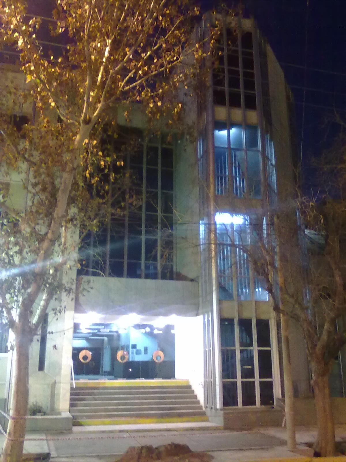 el edifiico principal de la facultad de ingienieria en la av libertador